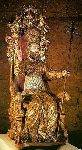 São Pedro Papa, madeira policromada, Portugal, século XVIII . Proveniente da Igreja de São Pedro dos Clérigos, em São Paulo. Acervo do Museu de Arte Sacra de São Paulo, Brasil.